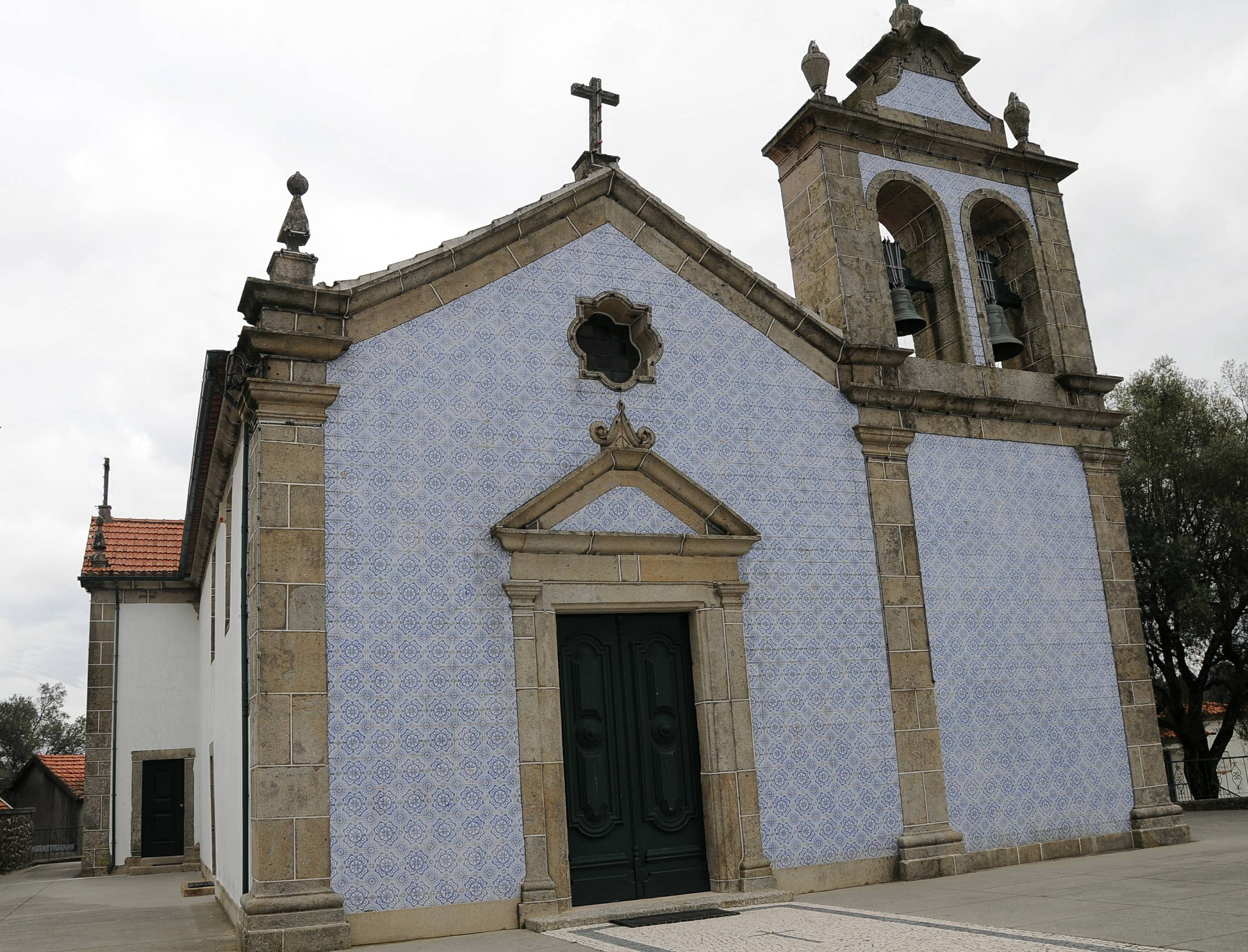 Sobreposta Church, in Braga, Portugal